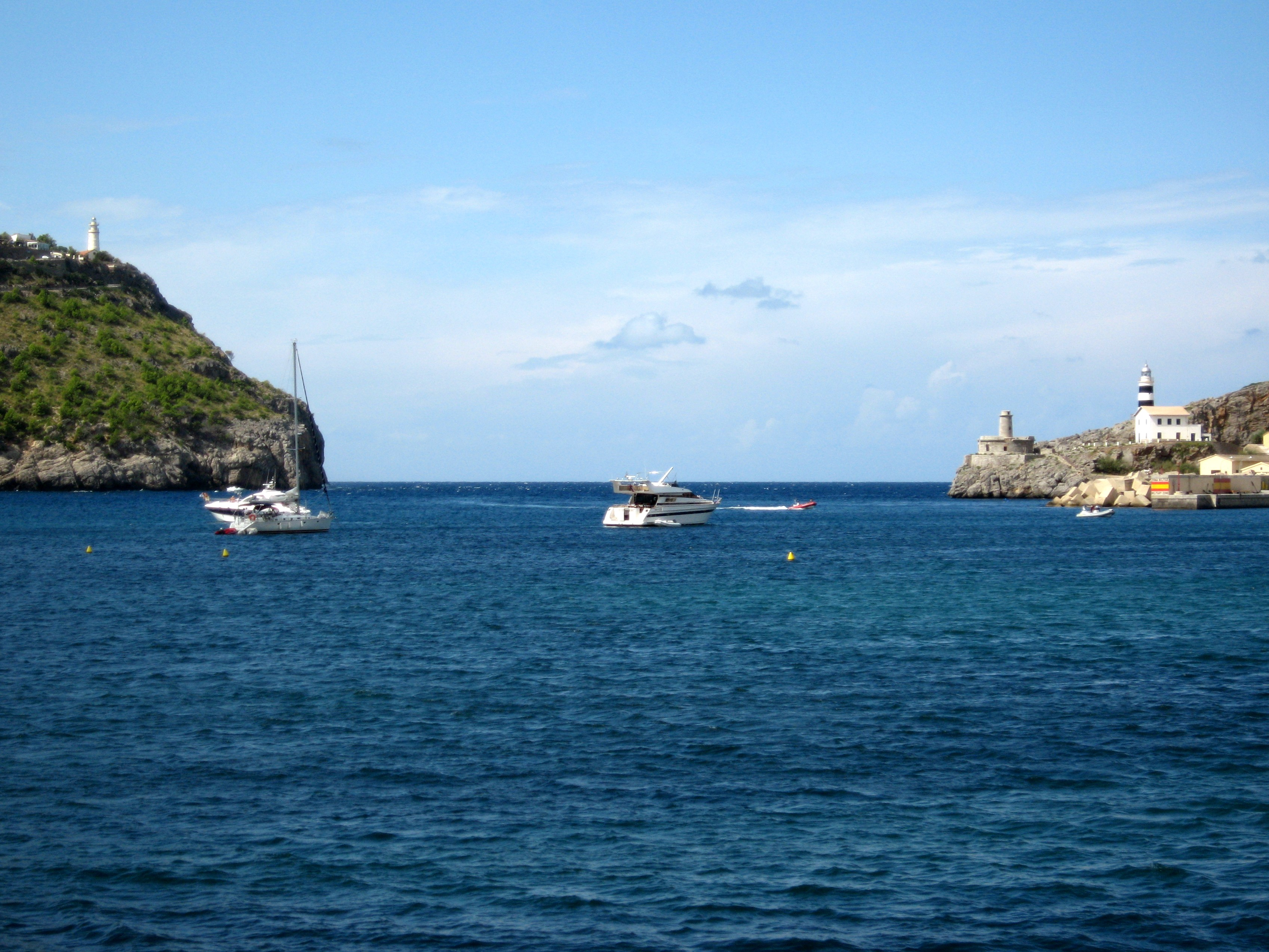 Hafeneinfahrt von Port de Sóller, Gemeinde Sóller, Mallorca, Spanien